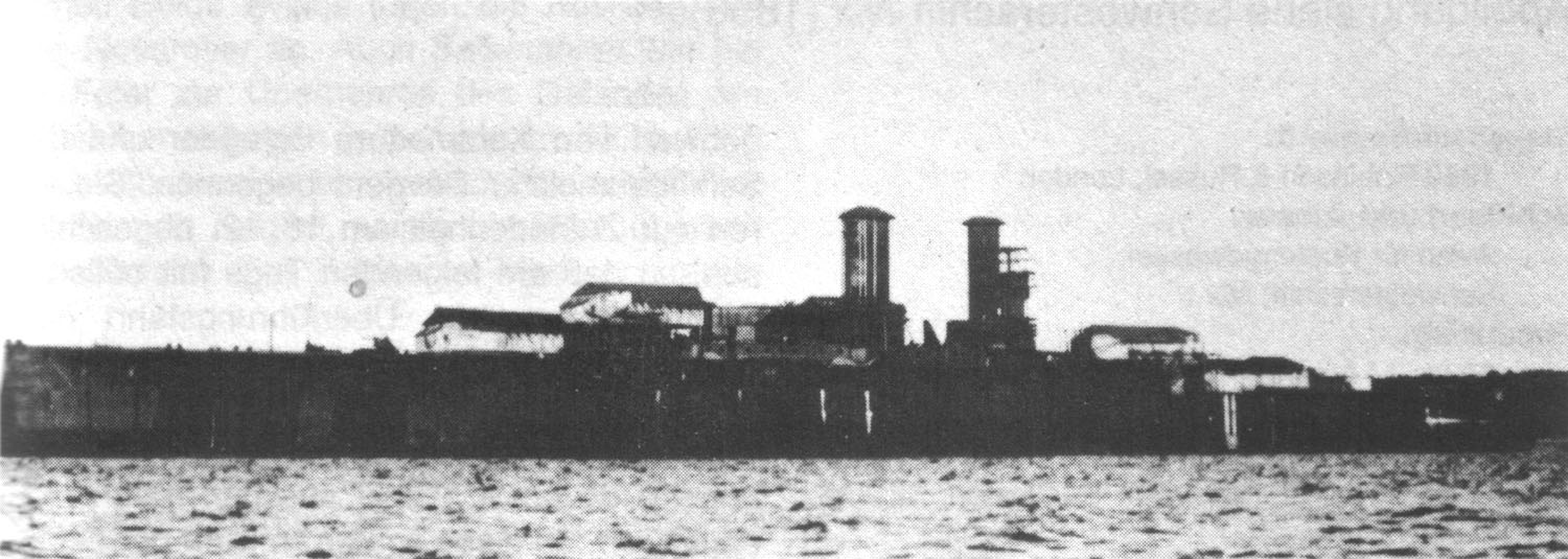 Das im Bau befindliche Großlinienschiff SMS Sachsen von backbord gesehen.